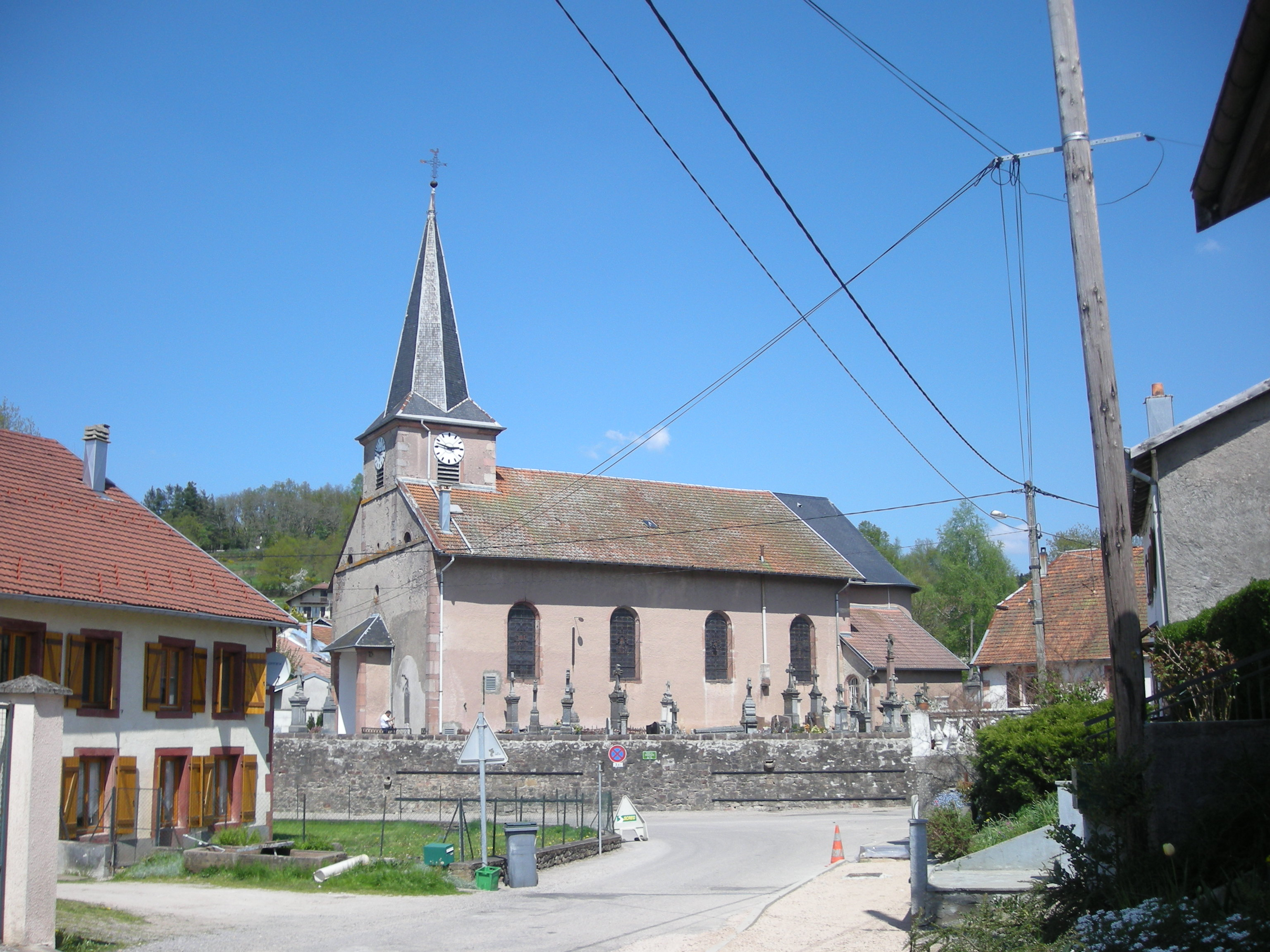 Vue de Coinches (département des Vosges) et de son église